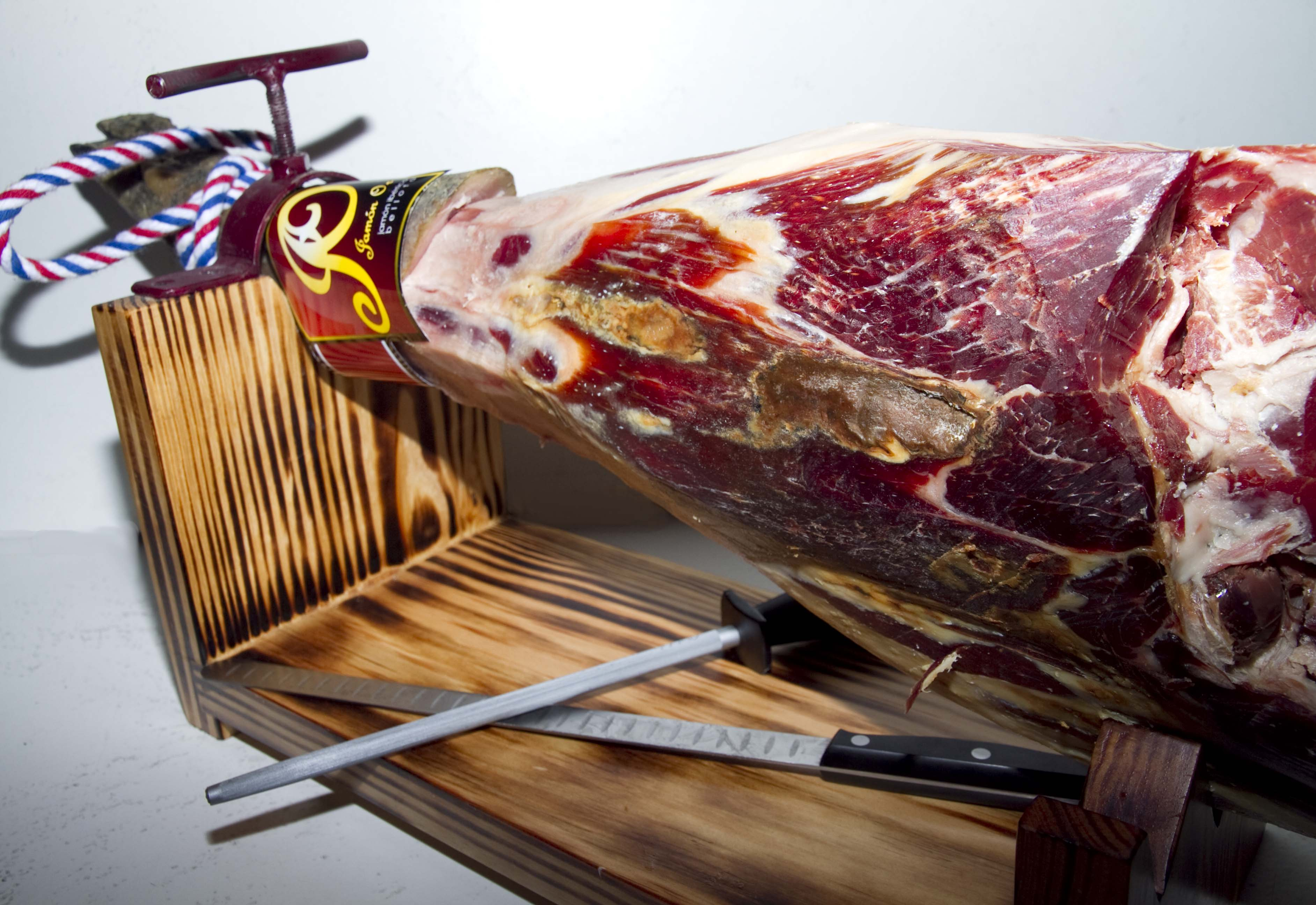 Tal vez, el mejor jamón ibérico de bellota del mercado. Un jamón hecho artesanalmente en Guijuelo, un Gran Reserva de 36meses de curación en secaderos naturales. De la empresa Jamón Or